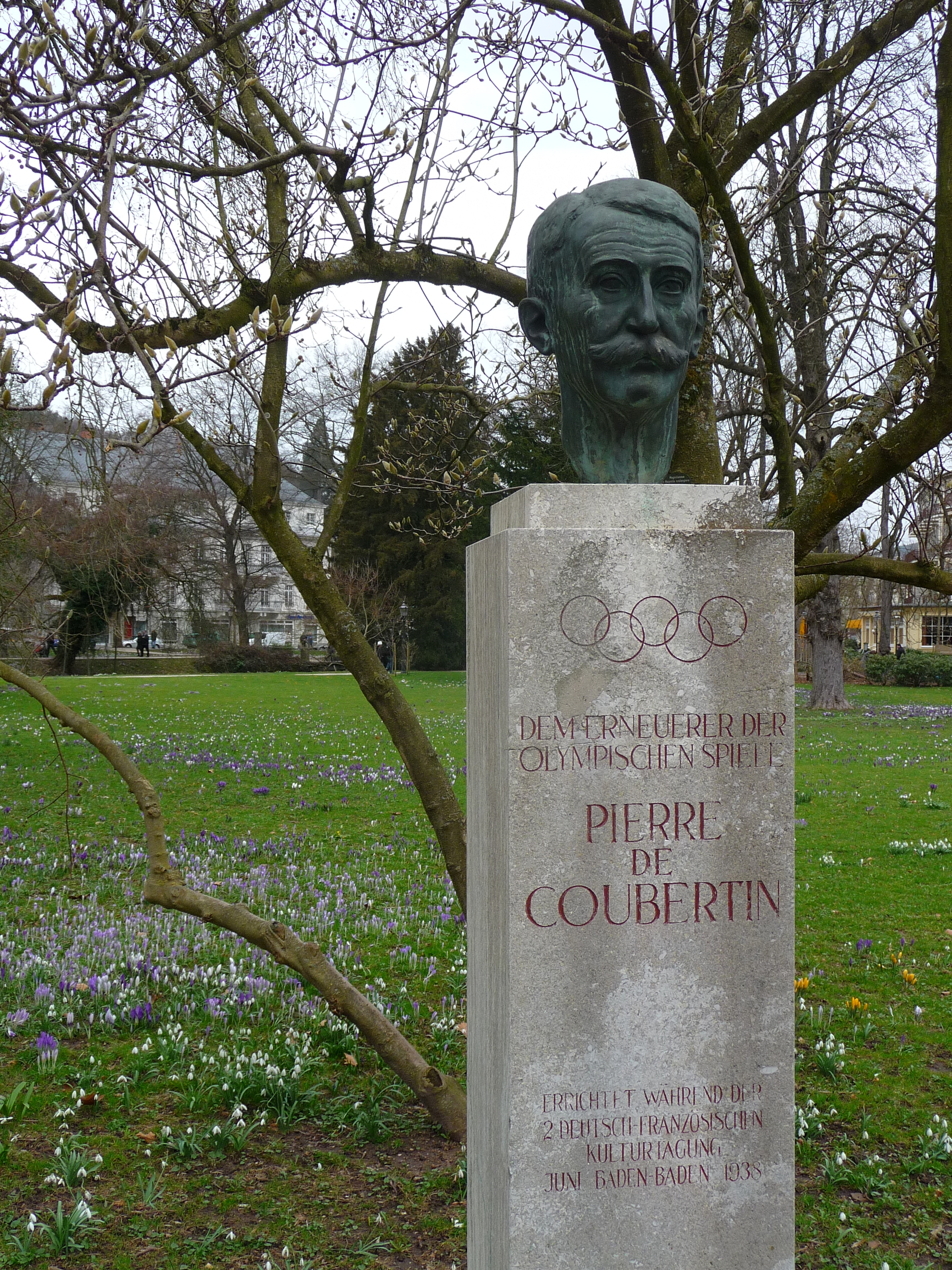 Büste des Pierre de Coubertin, aufgestellt in Baden-Baden während der zweiten deutsch-französischen Kulturtagung 1938